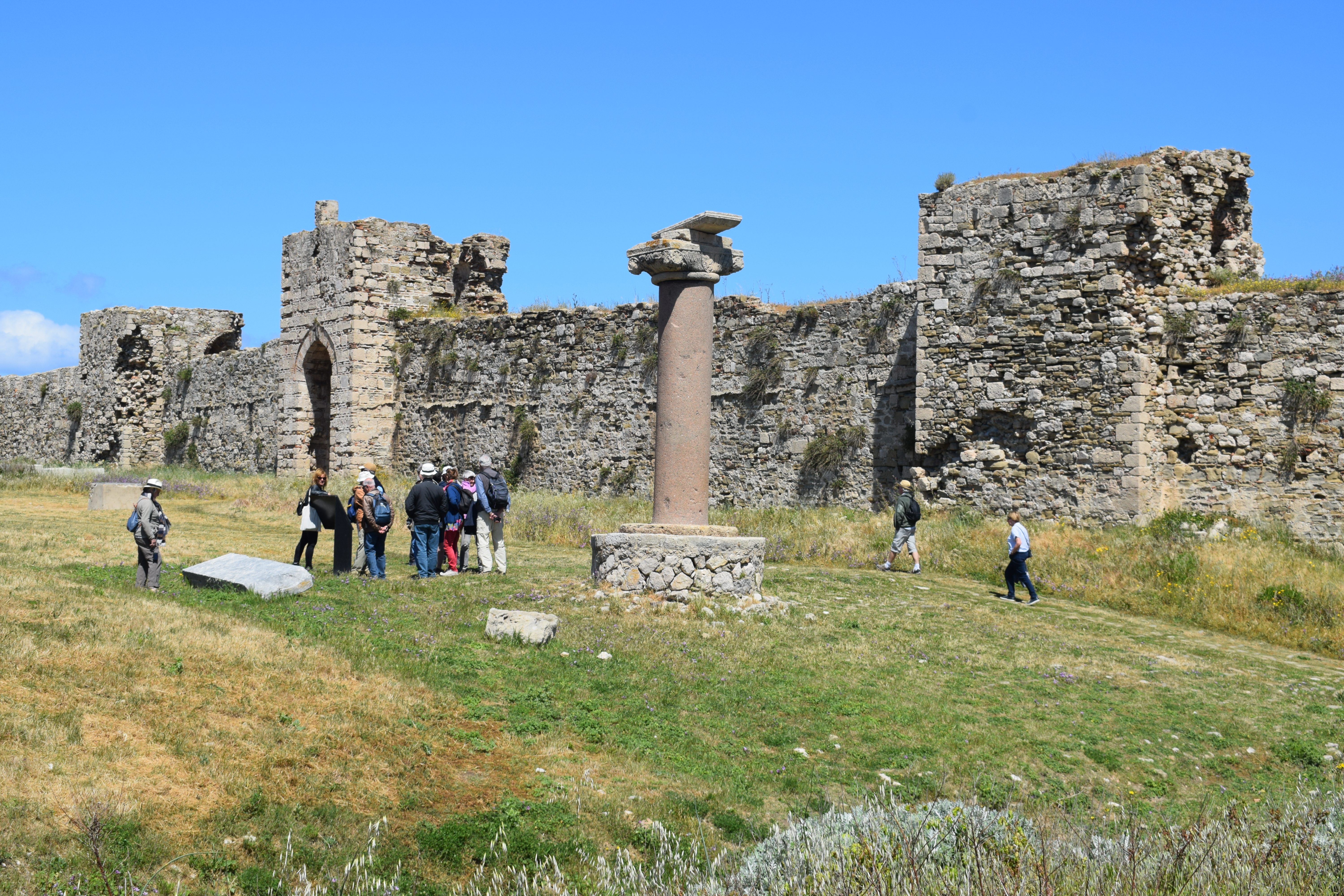 Vue du fort de Méthoni, dans le sud du Péloponnèse en Grèce.